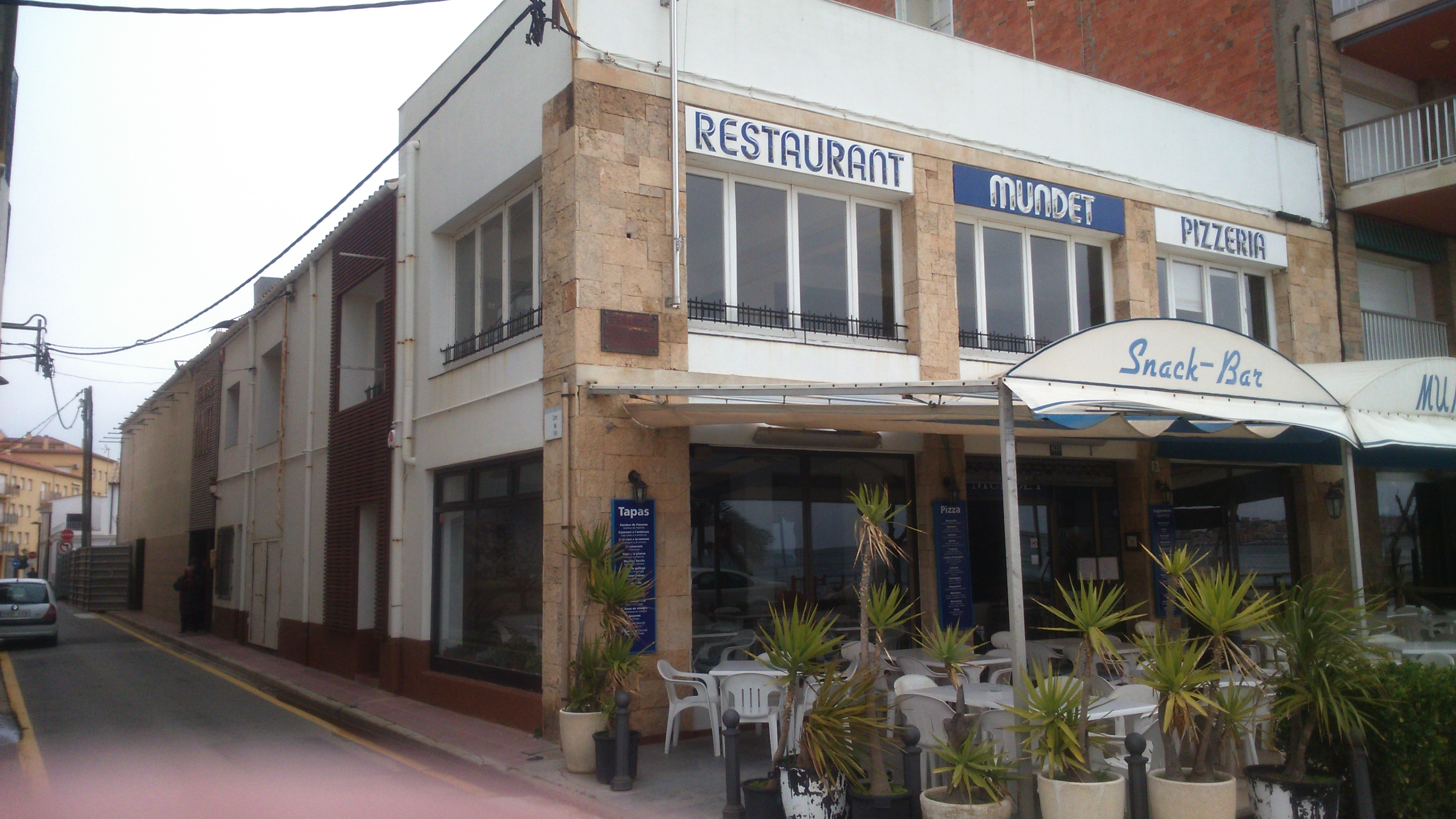 Edifici de la Germandat Artur Mundet, a sant Antoni de Calonge, que consta de bar, restaurant, teatre i locals diversos.